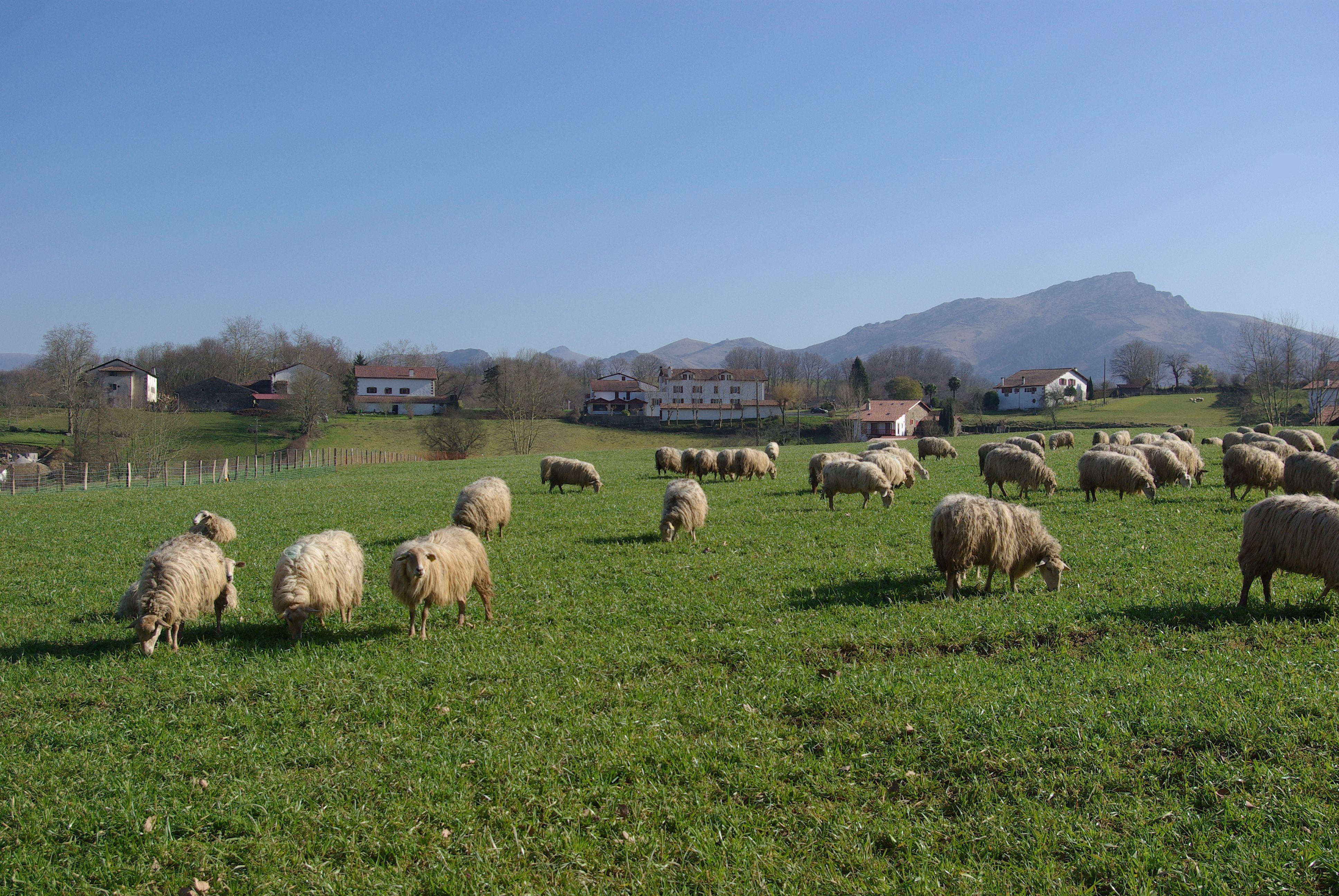 Brebis Manech Tête rousse à Sare, Pyrénées-Atlantiques, France.